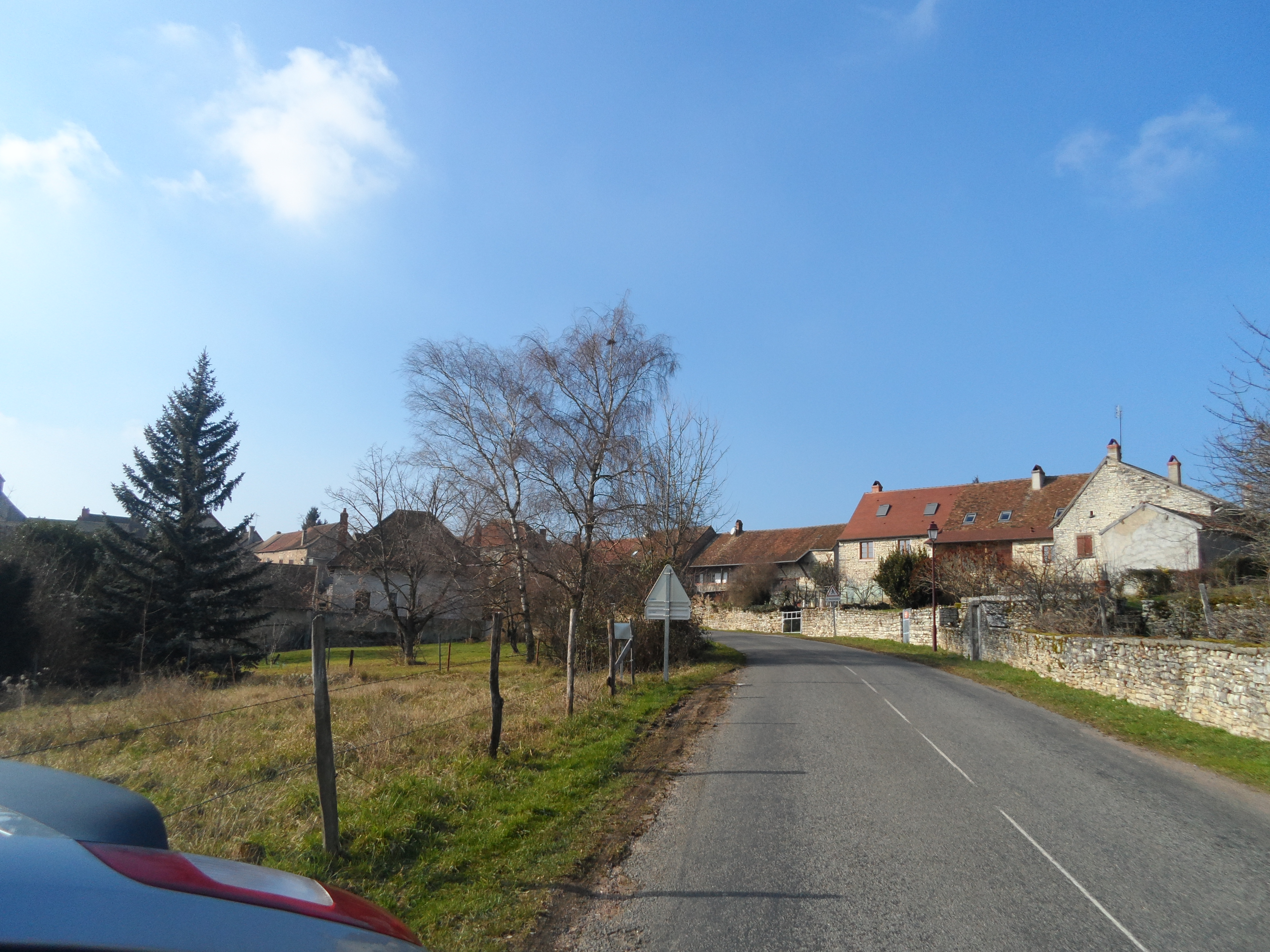 Village de Saint ythaire en 2013